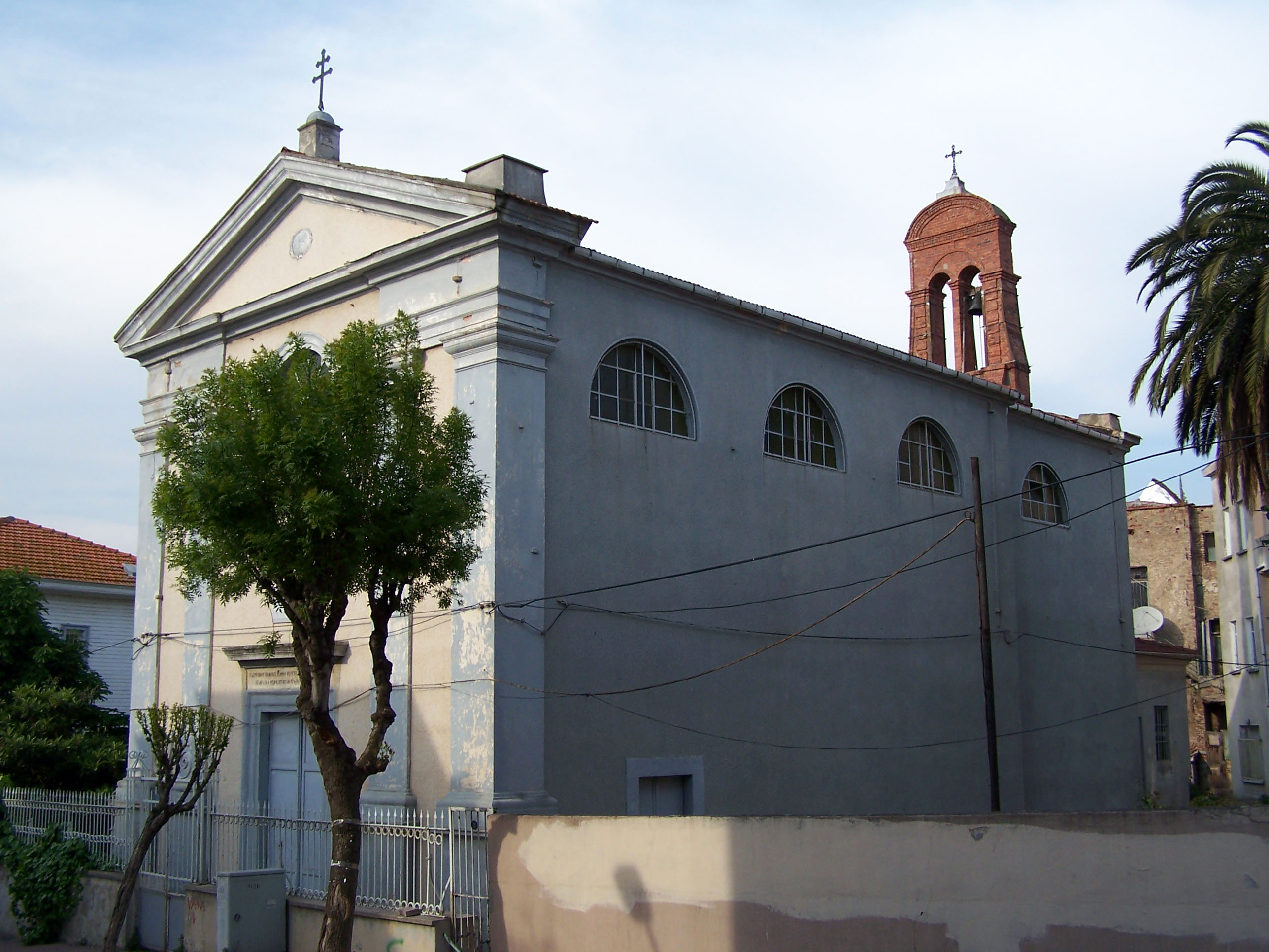 Büyükada Ermeni Katolik Surp Astvazazin Verapohum Kilisesi (Assumption Armenian Catholic Church) in Büyükada, Turkey